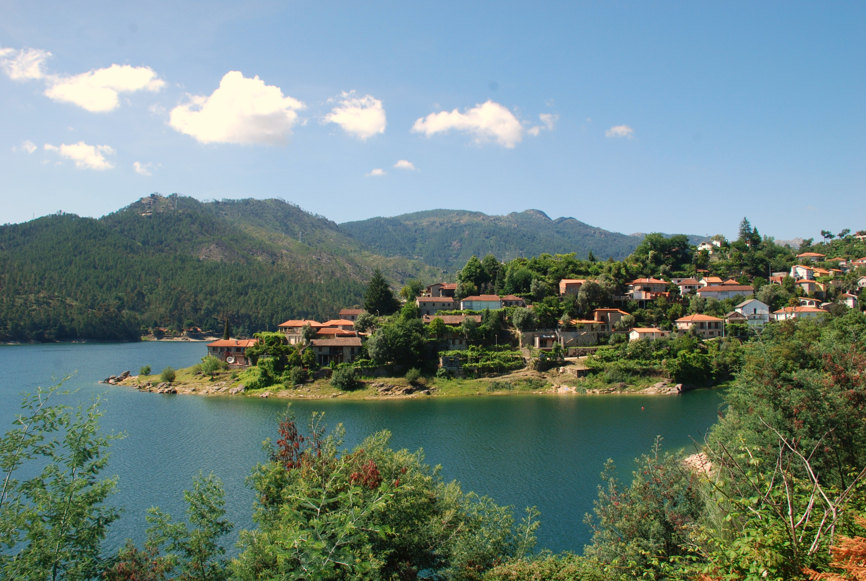 Admeus - Parque Nacional da Peneda-Gerês (Pan Park)